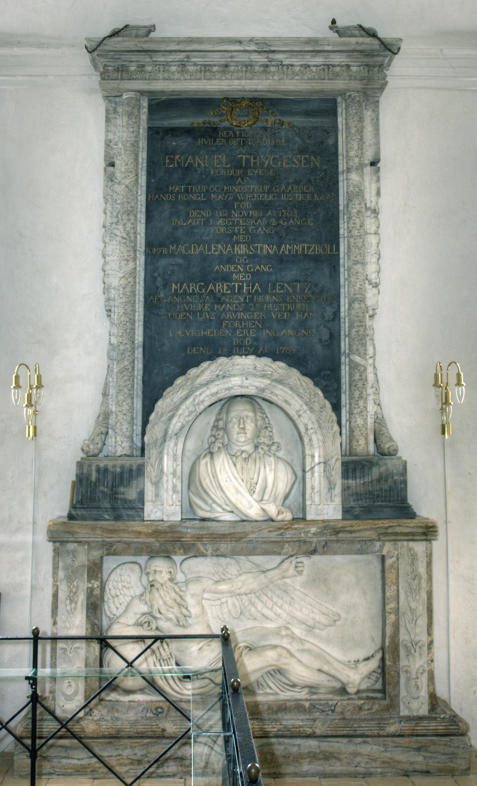 Kirche von Klovborg.